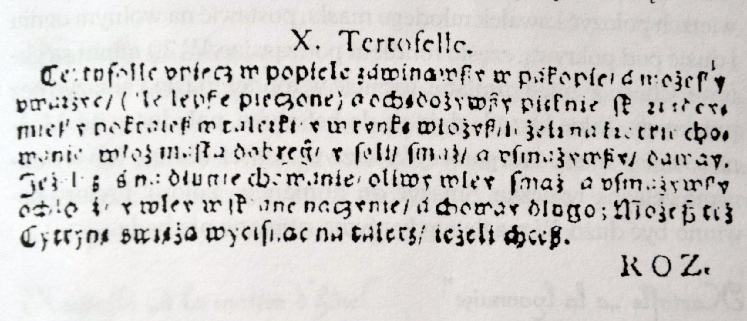 Tertofelle